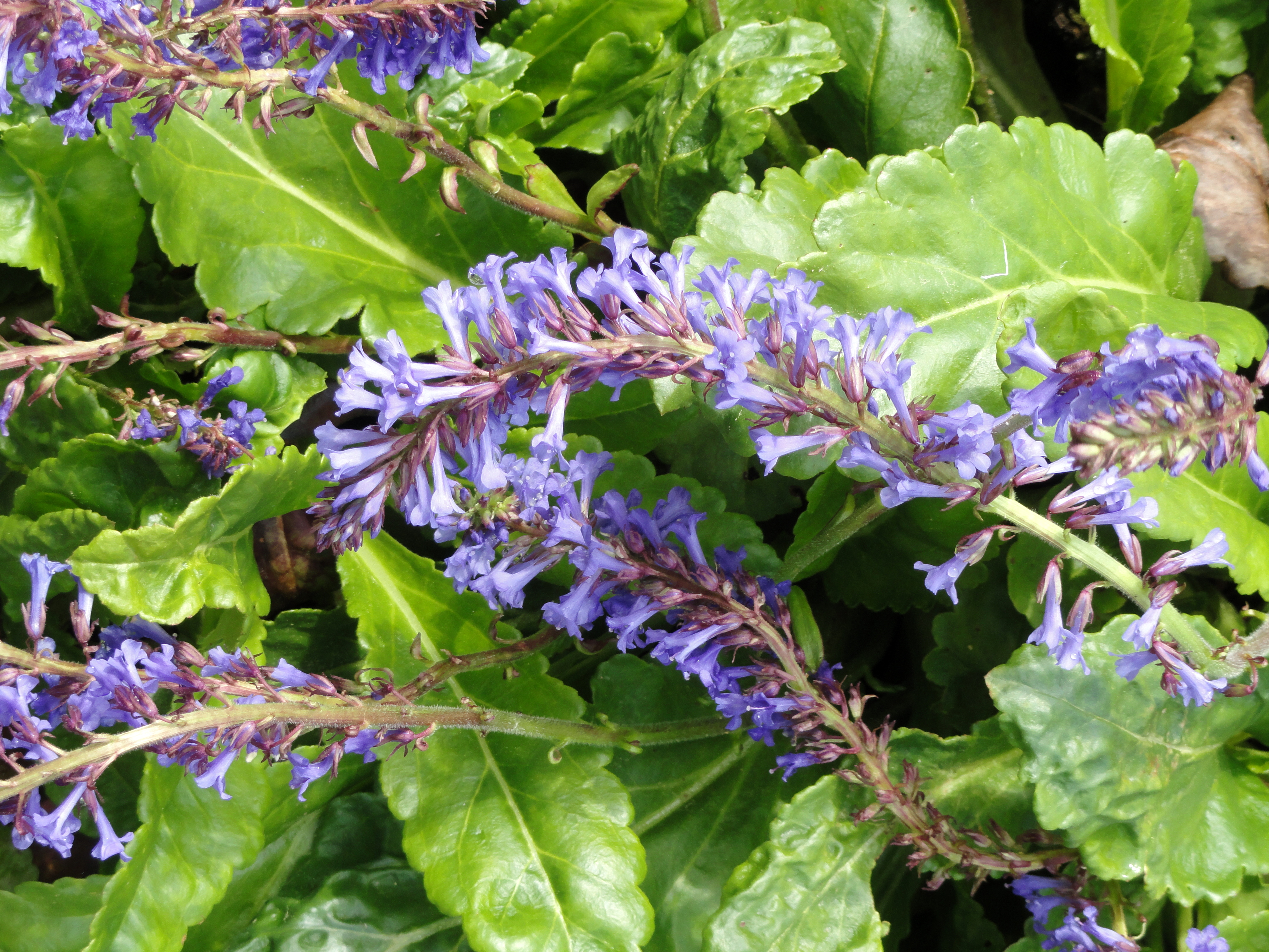 Wulfenia orientalis specimen in the Botanischer Garten München-Nymphenburg, Munich, Germany.